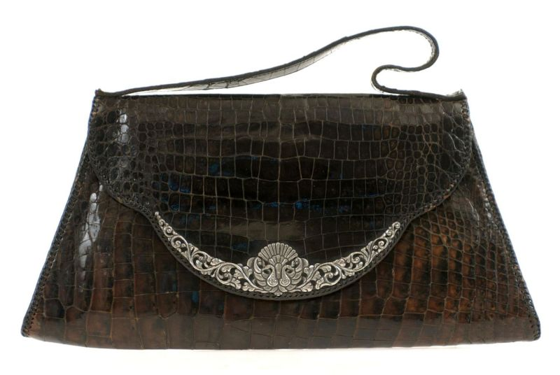 Tas. Krokodillen leren tas met in de tas een make-up spiegel en bijbehorende portemonnee.. Krokodillenleren tas met zilveren versiering en bijbehorend portemonnee